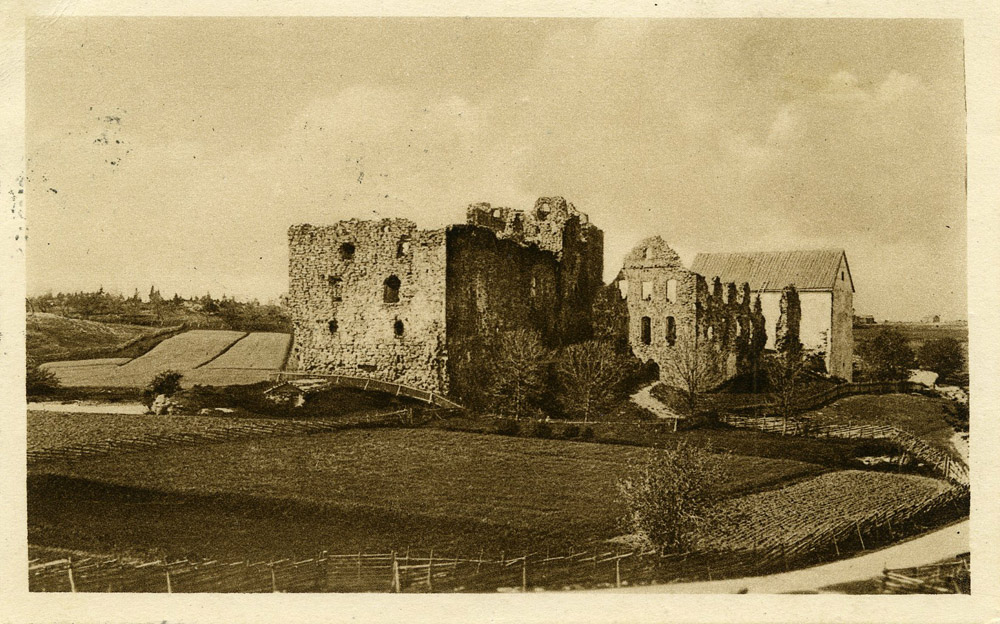 Руина Кастельхольма на Аландских островах